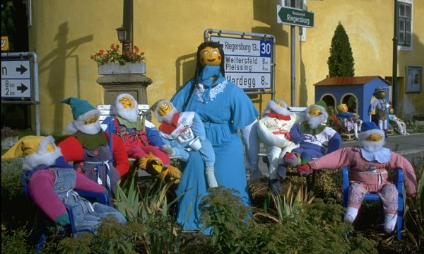 Kürbisfiguren in Niederfladnitz (Niederösterreich)